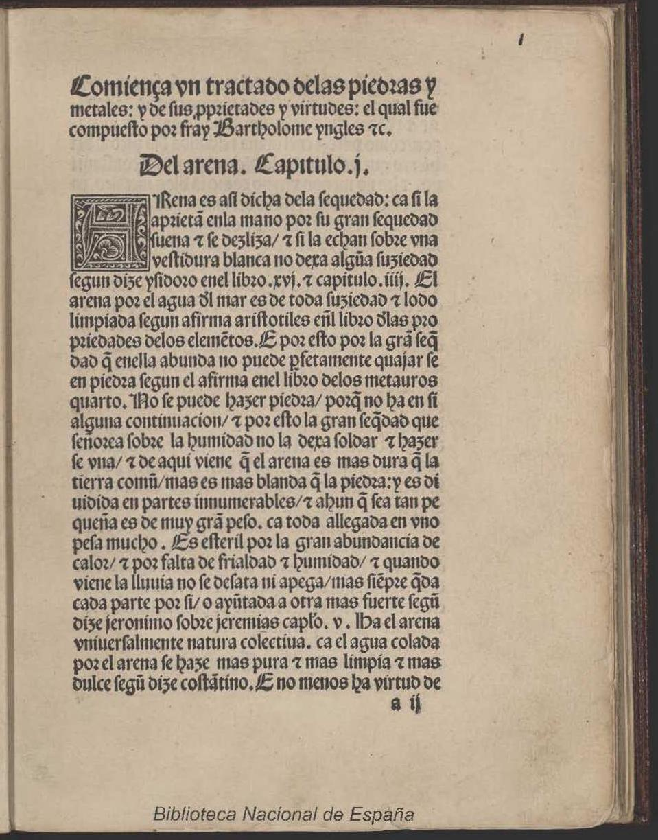 Tratado de los metales e piedras preciosas e de sus virtudes ; trad. por Fr. Vicente de Burgos Autor: Bartholomaeus Anglicus ; Vicente de Burgos (O.F.M.) Fecha: 1497 Datos de edición: Zaragoza, Pablo Hurus